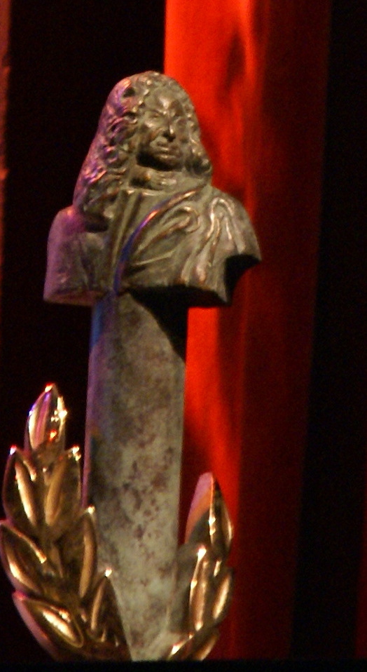 Der Hans-Carl-von -Carlowitz-Nachhaltigkeitspreis. eine Plastik des Künstlers Volker Beier.